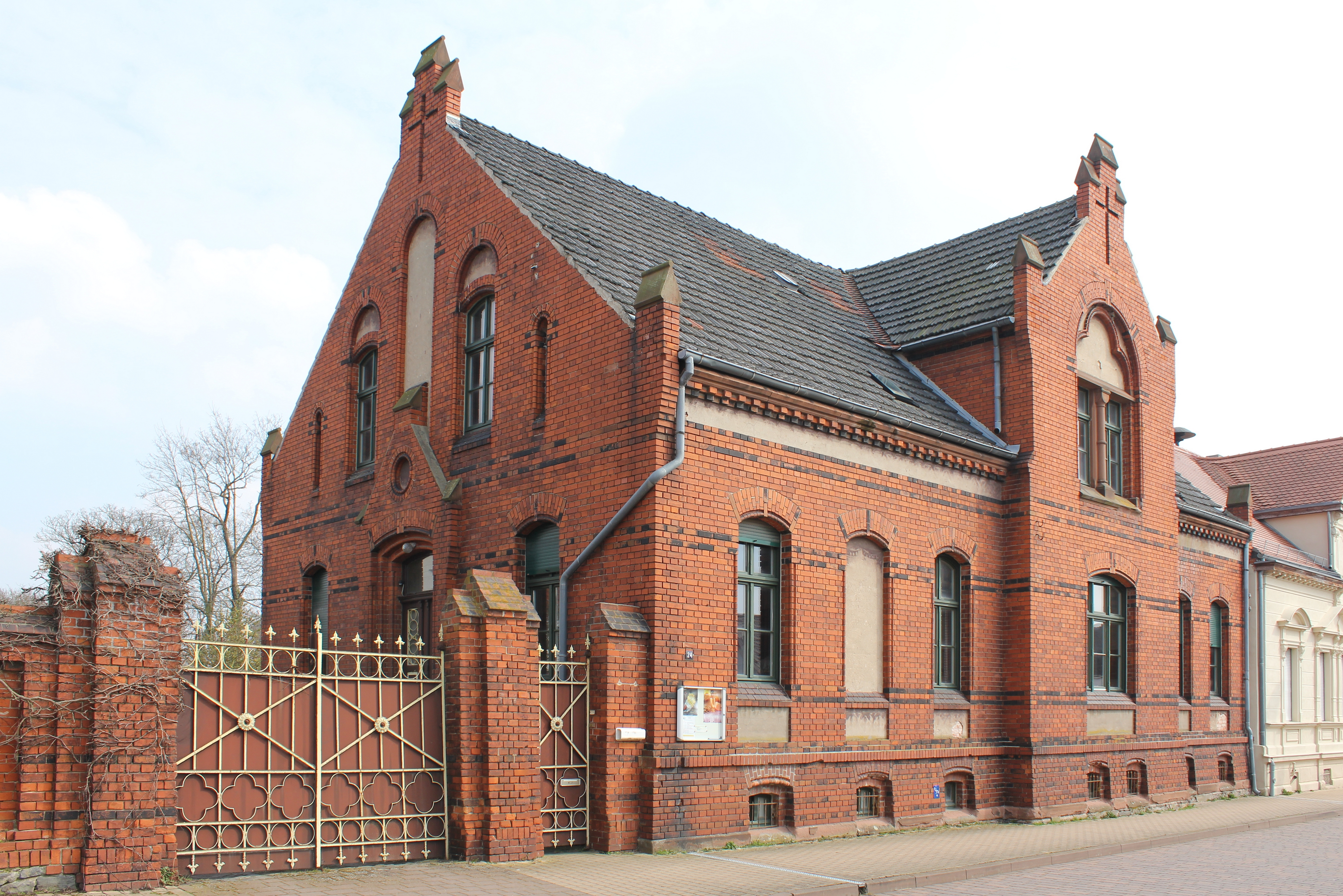 Pfarrhaus, Breite Straße 24, Glindenberg